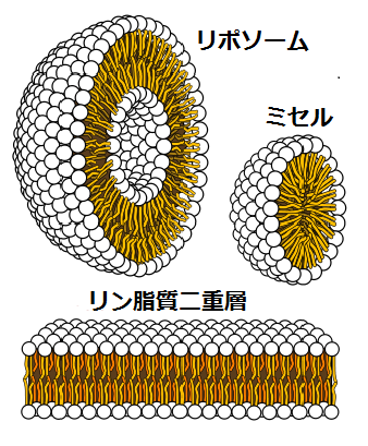 リン脂質が作る二重層・リポソーム・ミセル